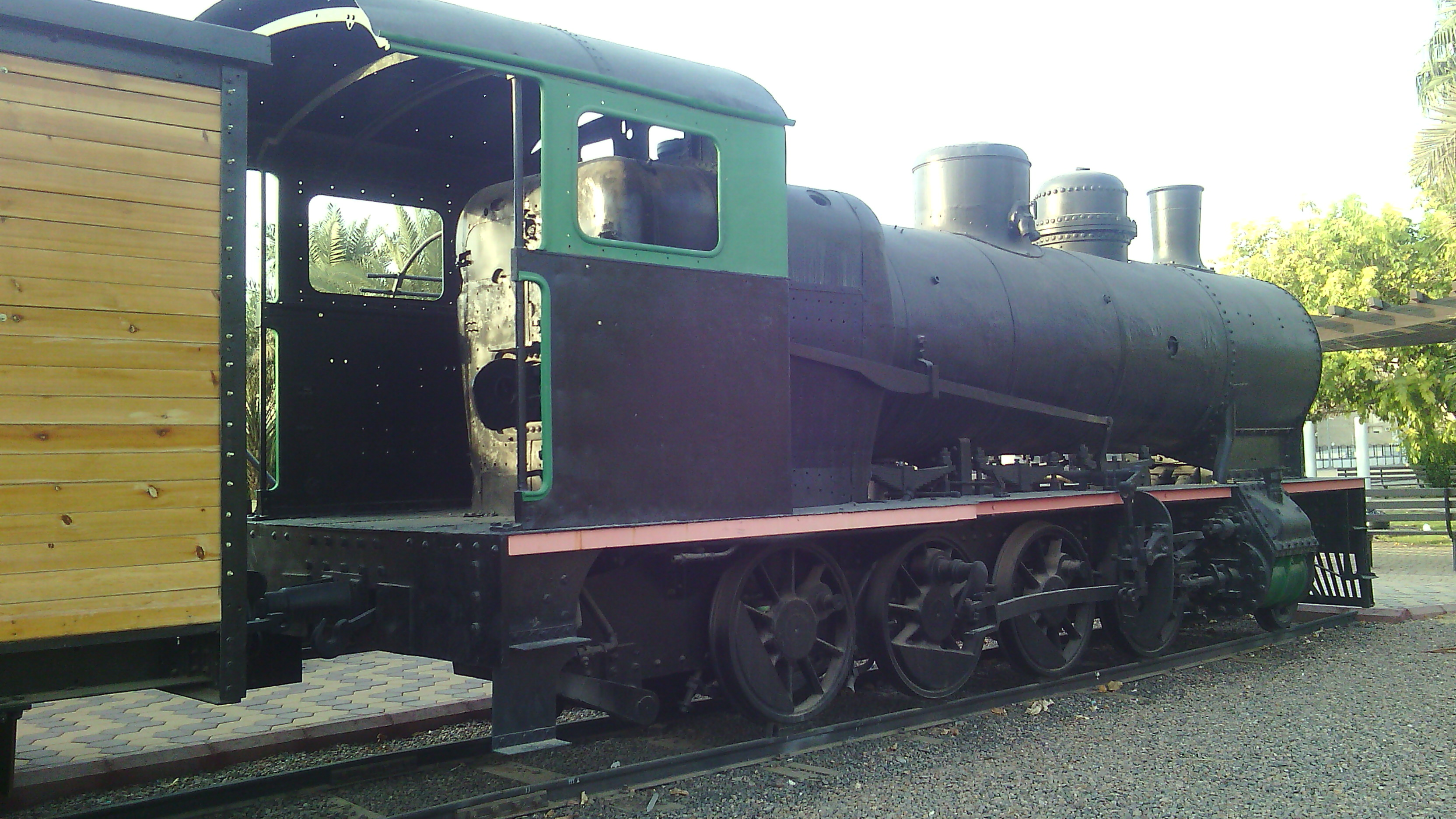 القطار المسخدم في السكة الحديدية الحجازية